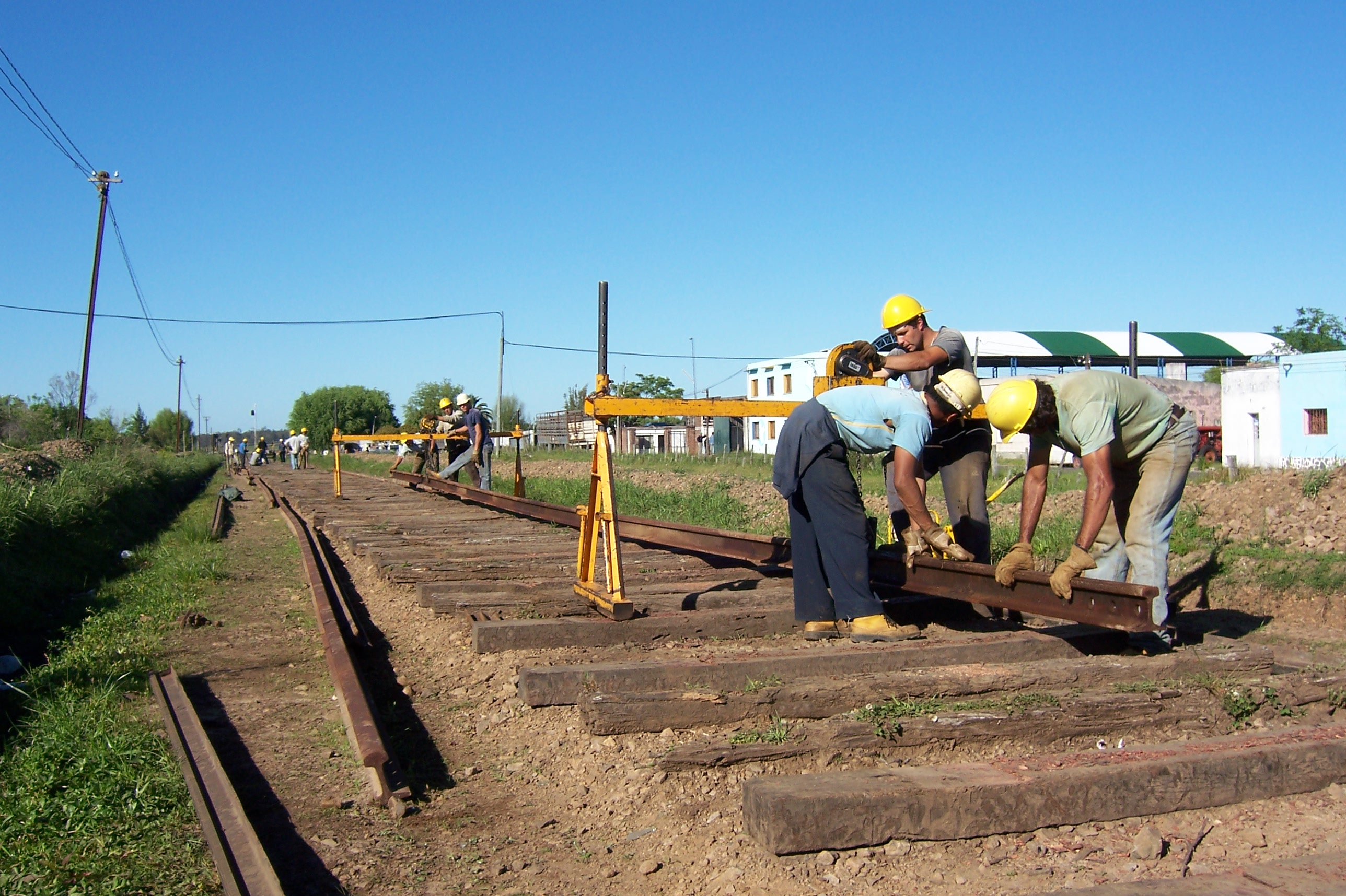 Cambio de rieles o carriles en una vía sobre durmientes de madera, Tacuarembó, Uruguay.